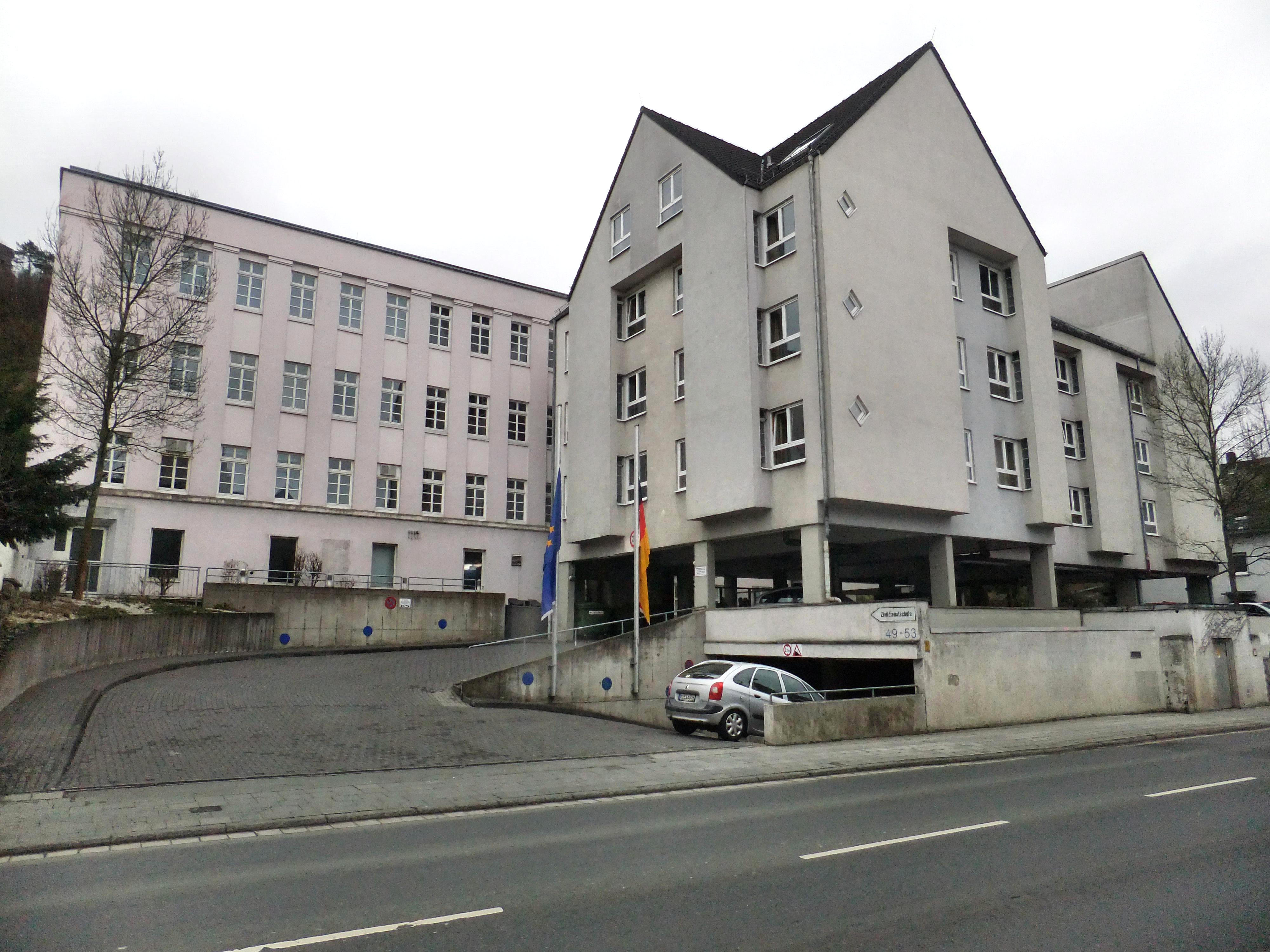 Die Zivildienstschule Wetzlar des Bundesamts für den Zivildienst in Wetzlar